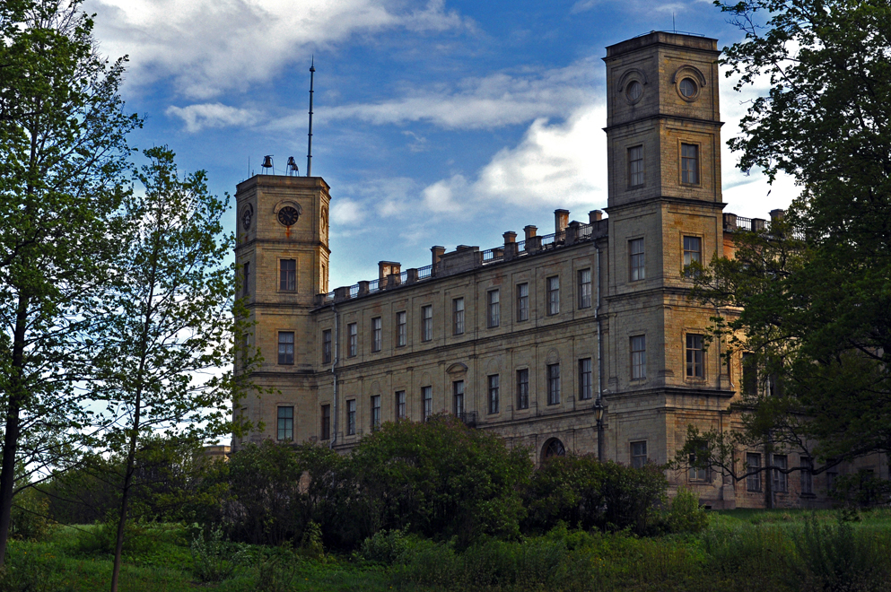 Большой Гатчинский дворец